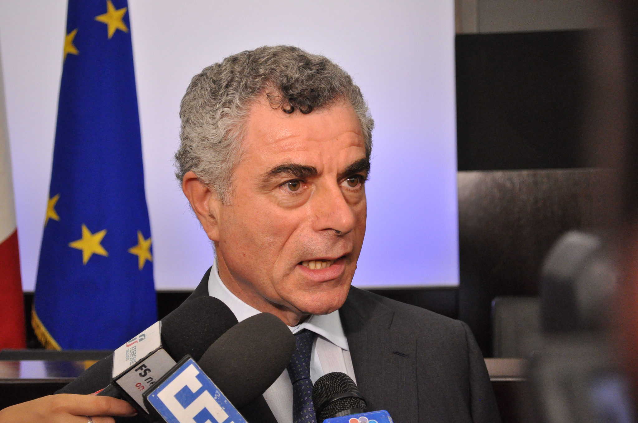 Mauro Moretti in occasione della firma del Contratto istituzionale di sviluppo per la realizzazione della direttrice ferroviaria Napoli-Bari-Lecce-Taranto.